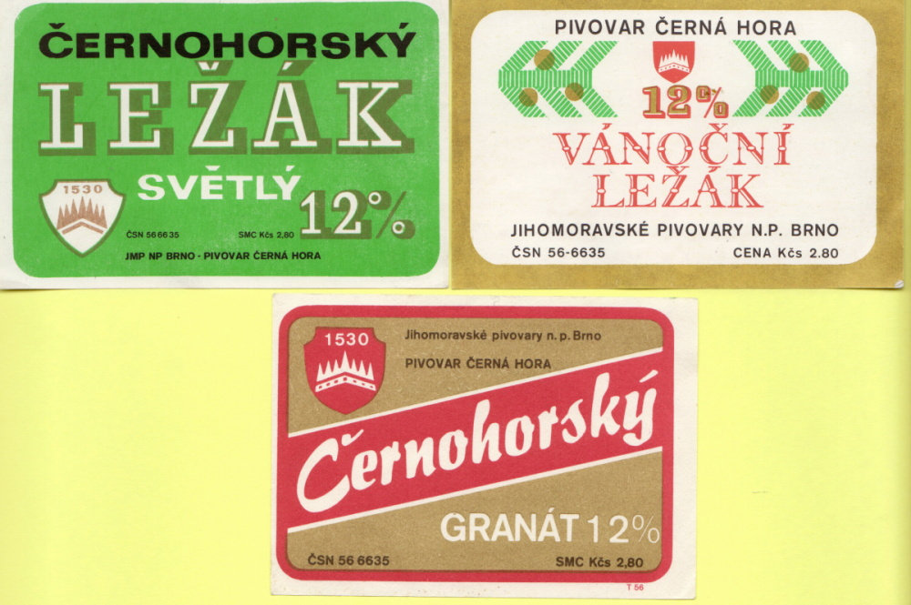 Nálepky černohorského piva před rokem 1989